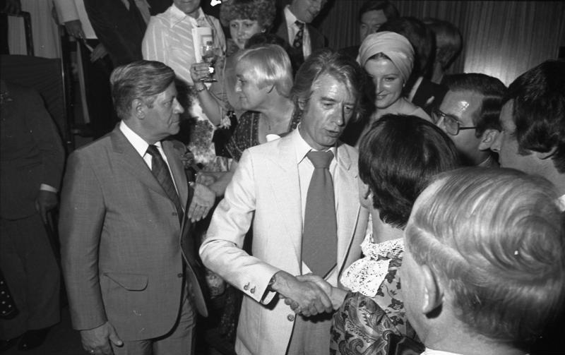 1.07.1977 Kanzlerfest